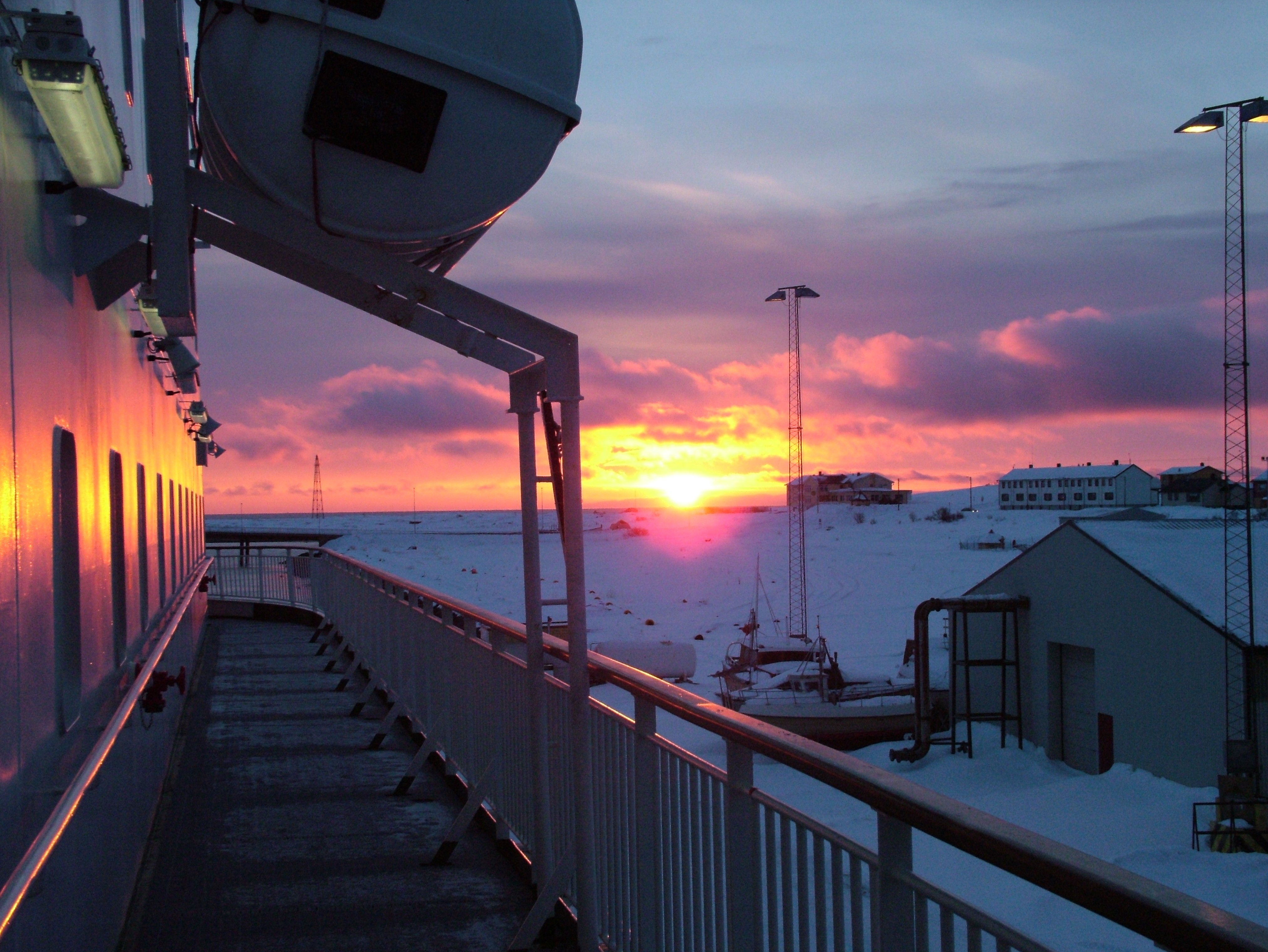 Vadsø in Nordnorwegen von dem Hurtigruten-Schiff MS Finnmark aus in der Morgendämmerung. Links der Mast ist Ankermast der Polarexpeditionen von Umberto Nobile 1926.